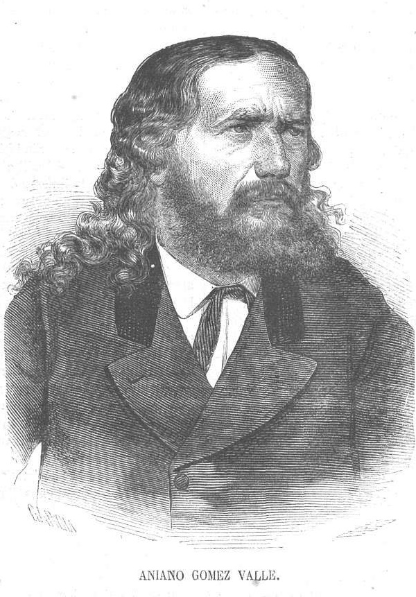 Aniano Gómez Valle. Grabado de La Ilustración Republicana Federal, n.º 3, 2 de julio de 1871, p. 36.